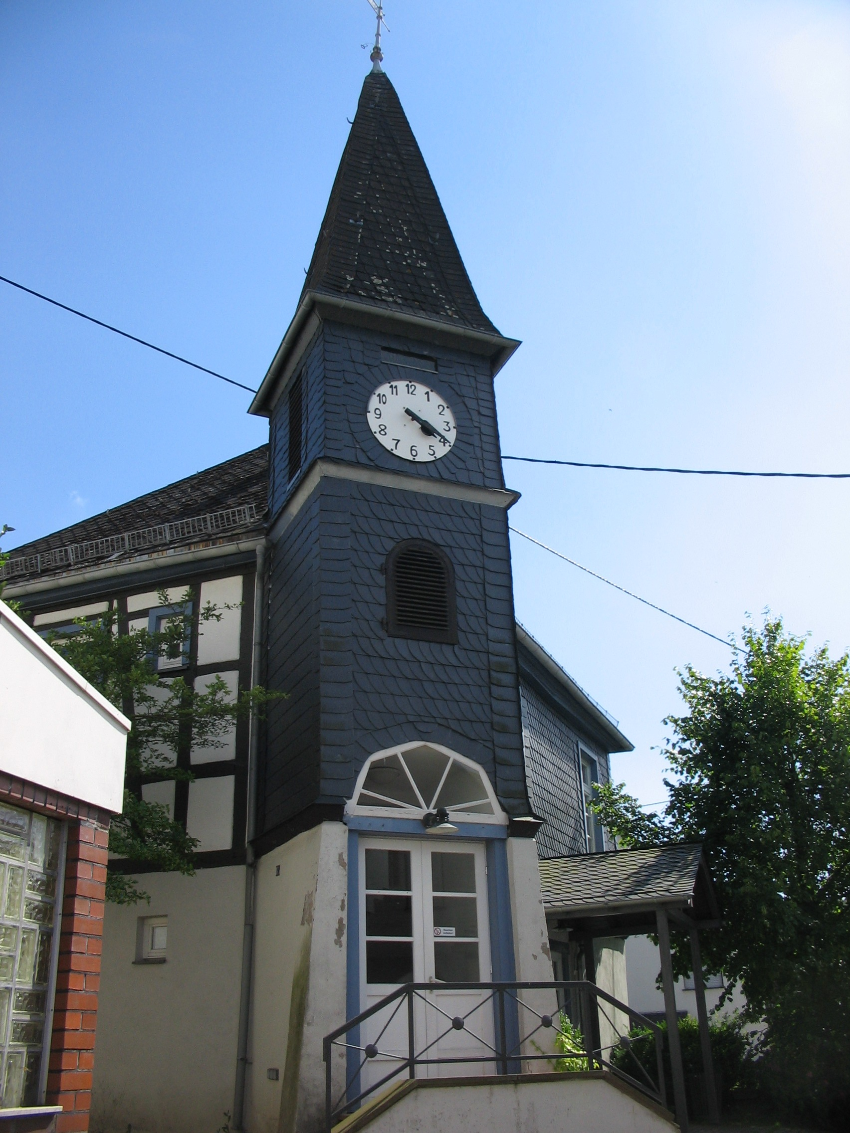 Uhrtürmchen des alten Rathauses in Hausen vor der Höhe mit Eingangstür